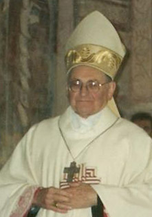 Giacomo Capuzzi - Vescovo emerito di Lodi